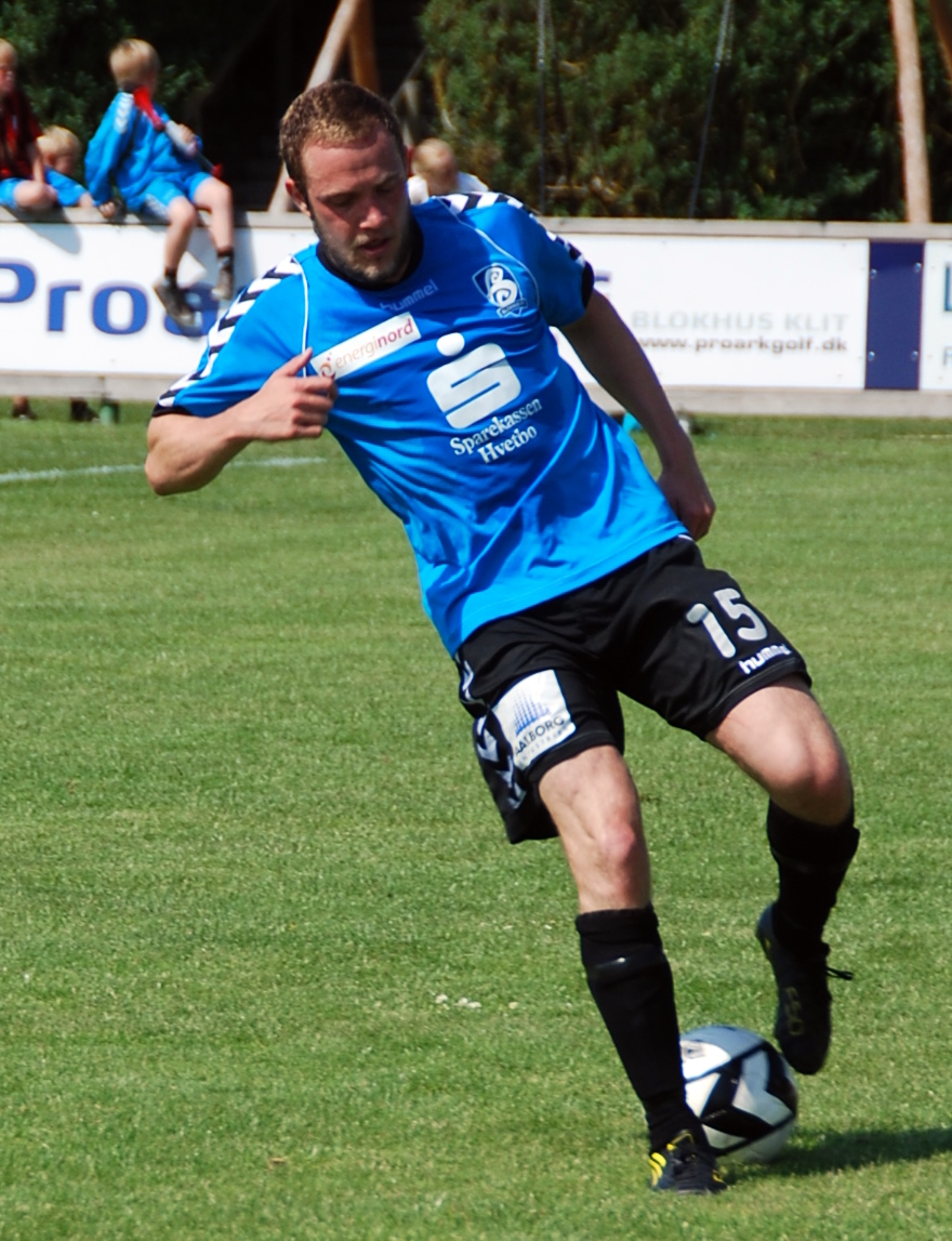 Fodboldspilleren Christian Overby fra Blokhus FC. Her i 2. divisionskampen mod Varde IF på Jetsmark Stadion i Pandrup.